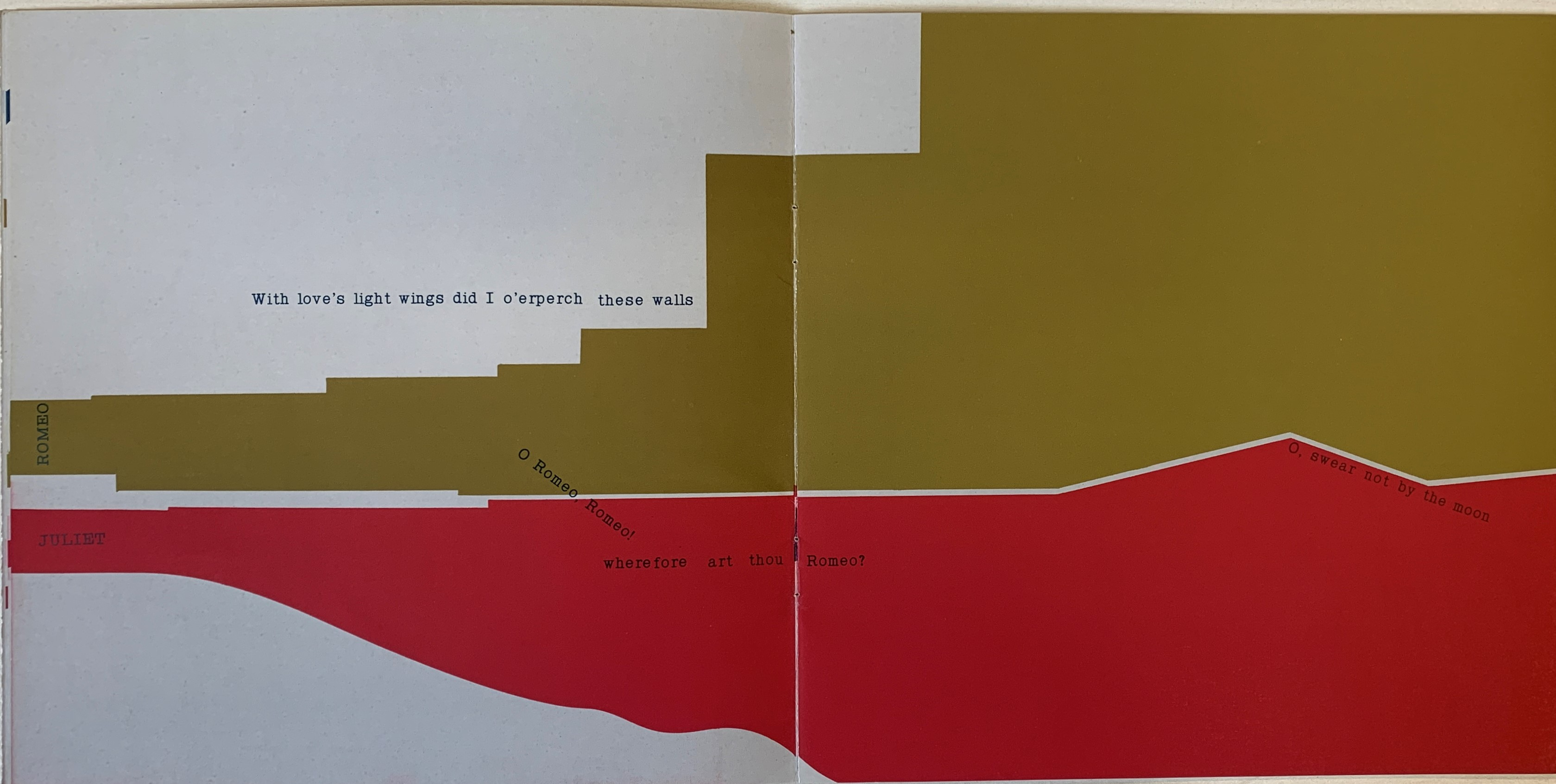 Pagina del libro Romeo and Juliet di Shigeo Fukuda